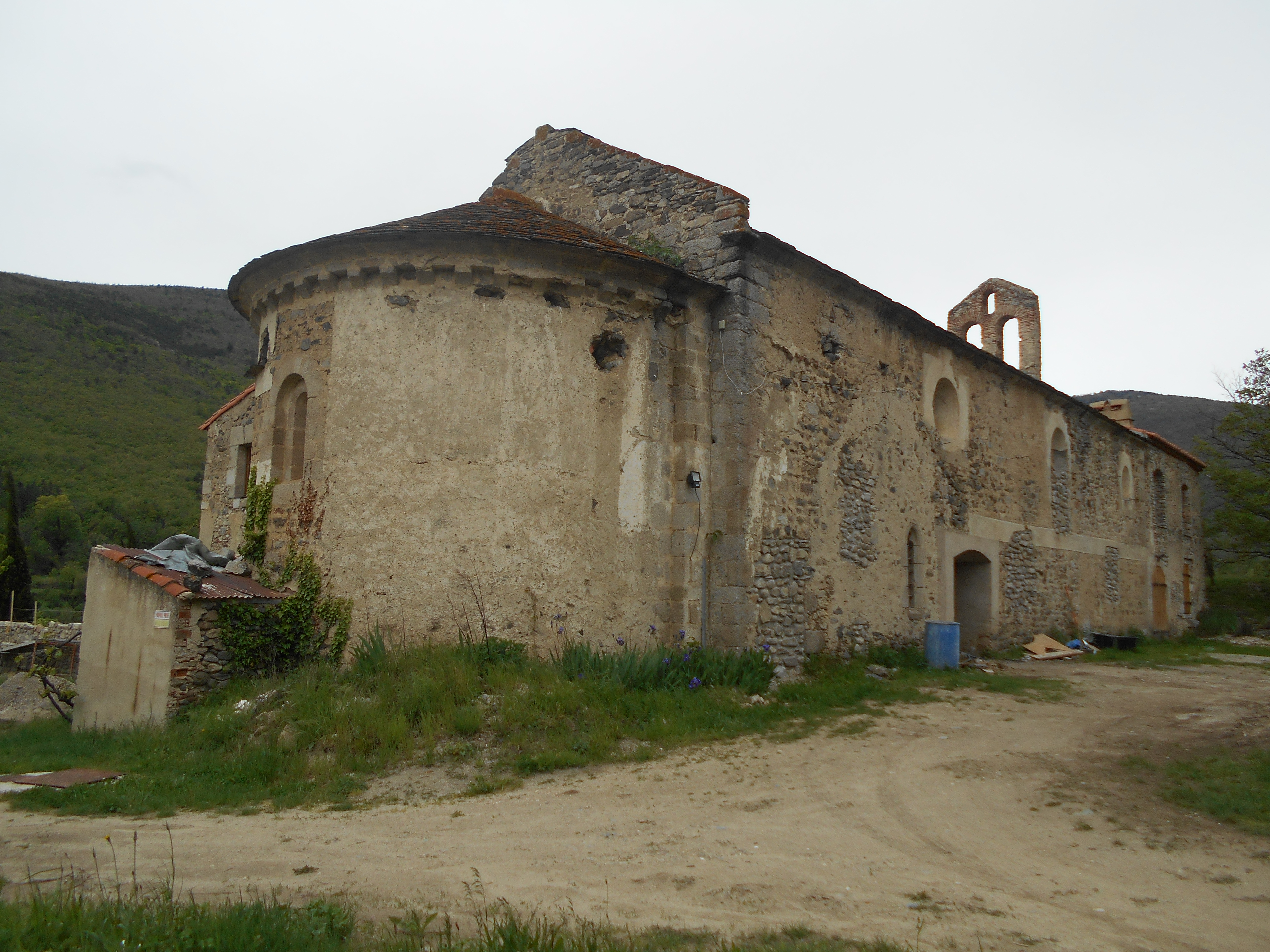 Santa Maria de Corbiac, a Mosset